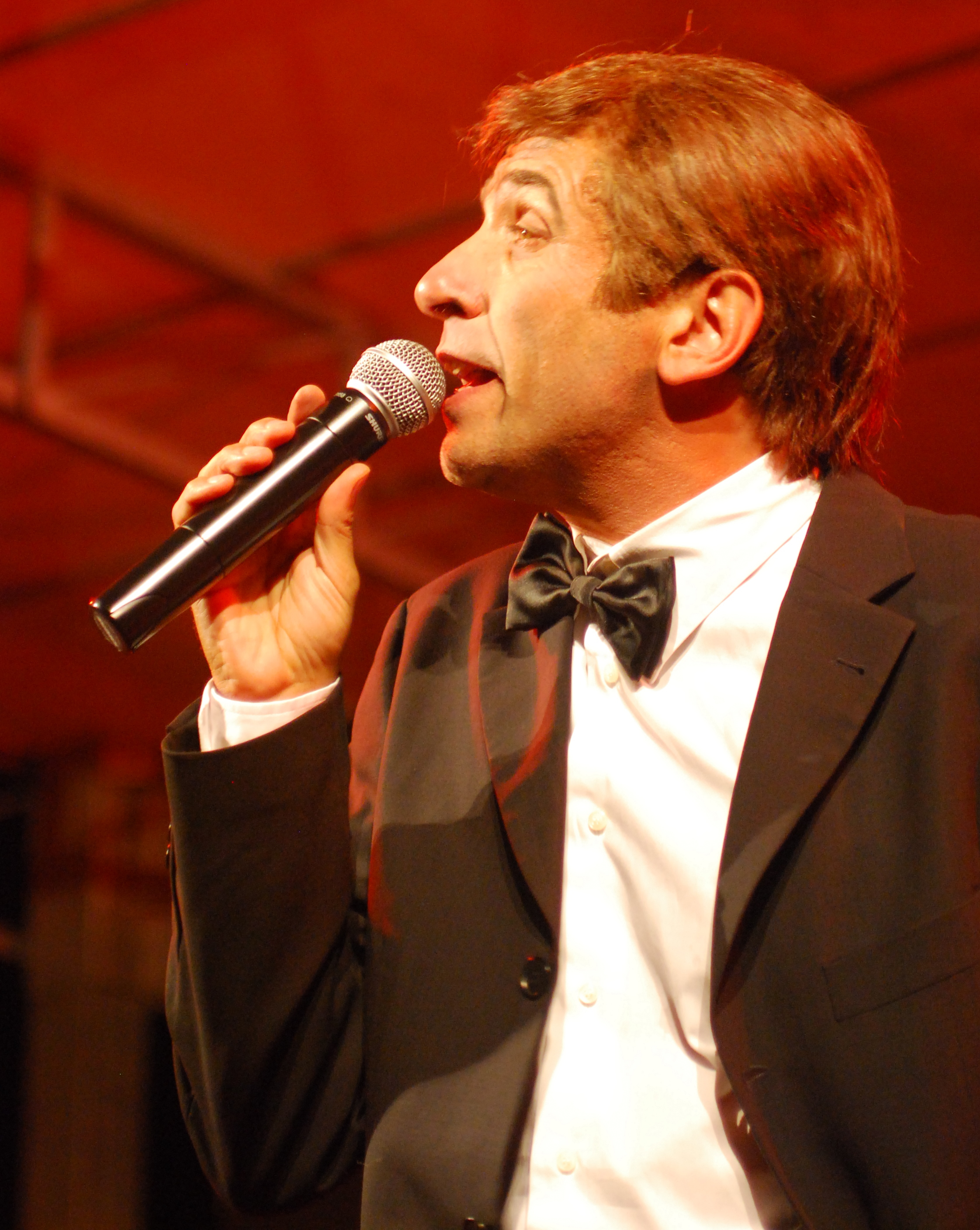 Dario Ballantini nei panni di Gianni Morandi a Piné sotto le stelle 2011 (Baselga di Piné).